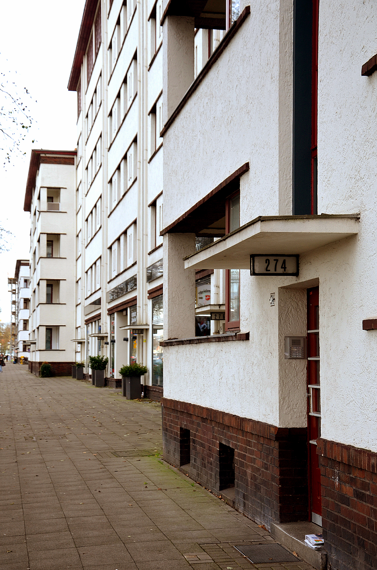 Blick entlang eines Teils 1929 bis 1931 von dem Architekten Adolf Falke erstmals in Zeilenbauweise errichteten Liststadt an der Podbielskistraße in Hannover, Stadtteil List, hier der Eingang mit der (heutigen) Hausnummer 274, vor der der Stolperstein für den denunzierten Michael Umansky (1897-1944) verlegt wurde ...